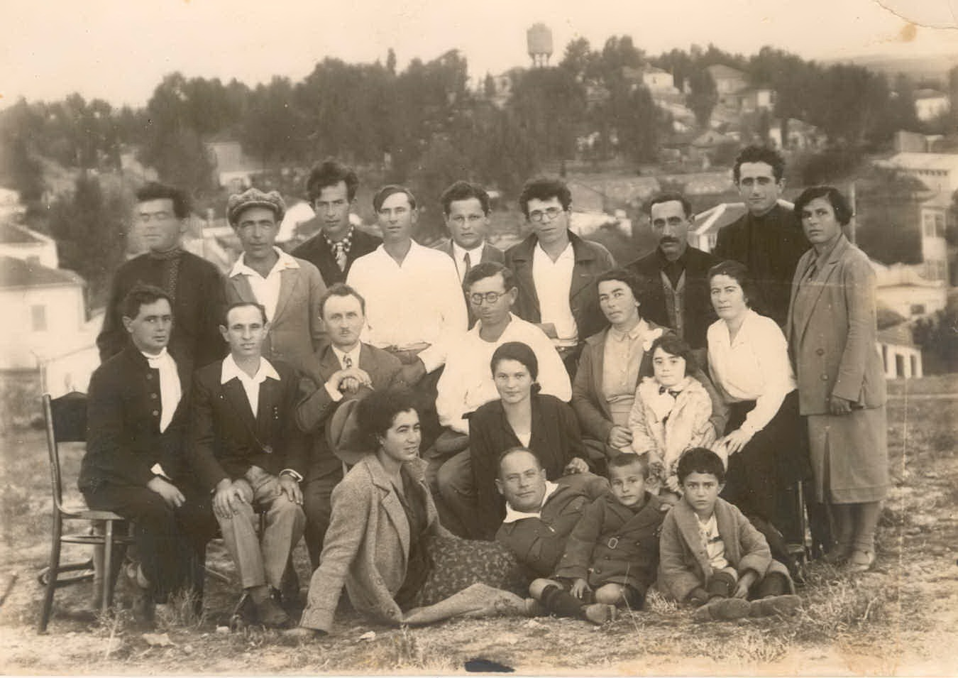 קבוצת פועלים שעבדו ברחובות לימים הקימו את "חברות הדרום" שיצרה קבוצת עבודה עבדו ברחובות וגם ברוחמה בתמונה: עומדים מימין לשמאל: שלישי: צבי סוחובלסקי, רביעי יונה קוסו (כסה), שישי: אליעזר מלרוד, שביעי: יצחק חסקים, שמיני: משה הררי (הוכברג) יושב שלישי משמאל: ד"ר מרשוב